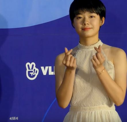 5월 1일 오후 서울시 강남구 삼성동 코엑스에서 제 55회 백상예술대상 시상식 레드카펫 행사가 열렸다.